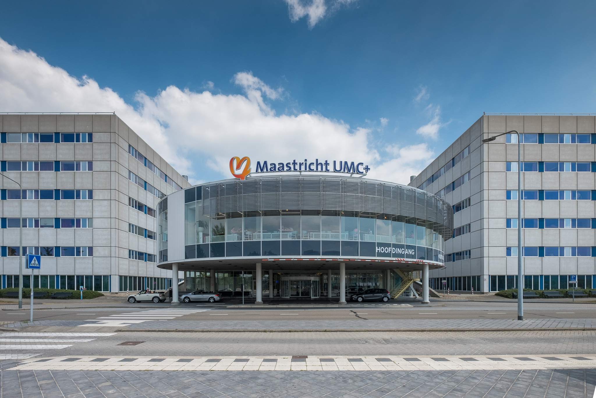 Hoofdingang van het Maastricht UMC+